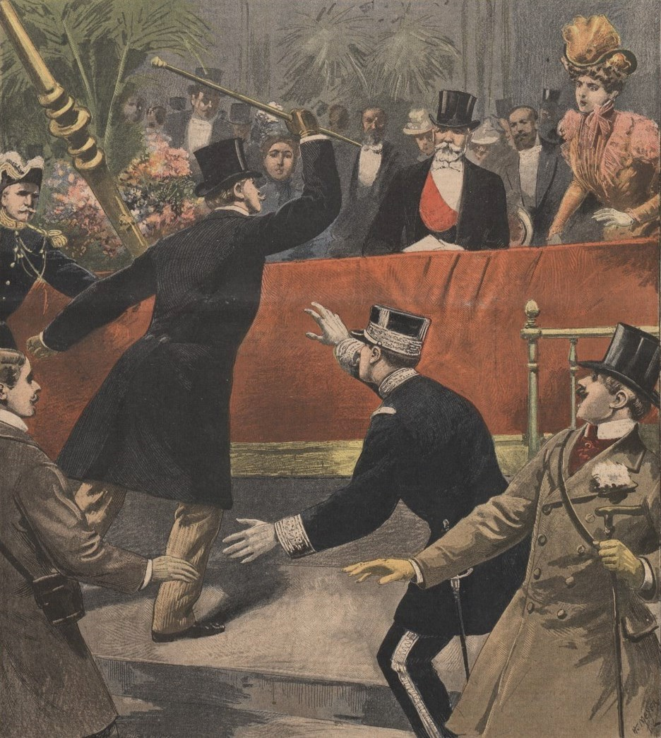 "Les incidents d'Auteuil. Agression contre le Président de la République."